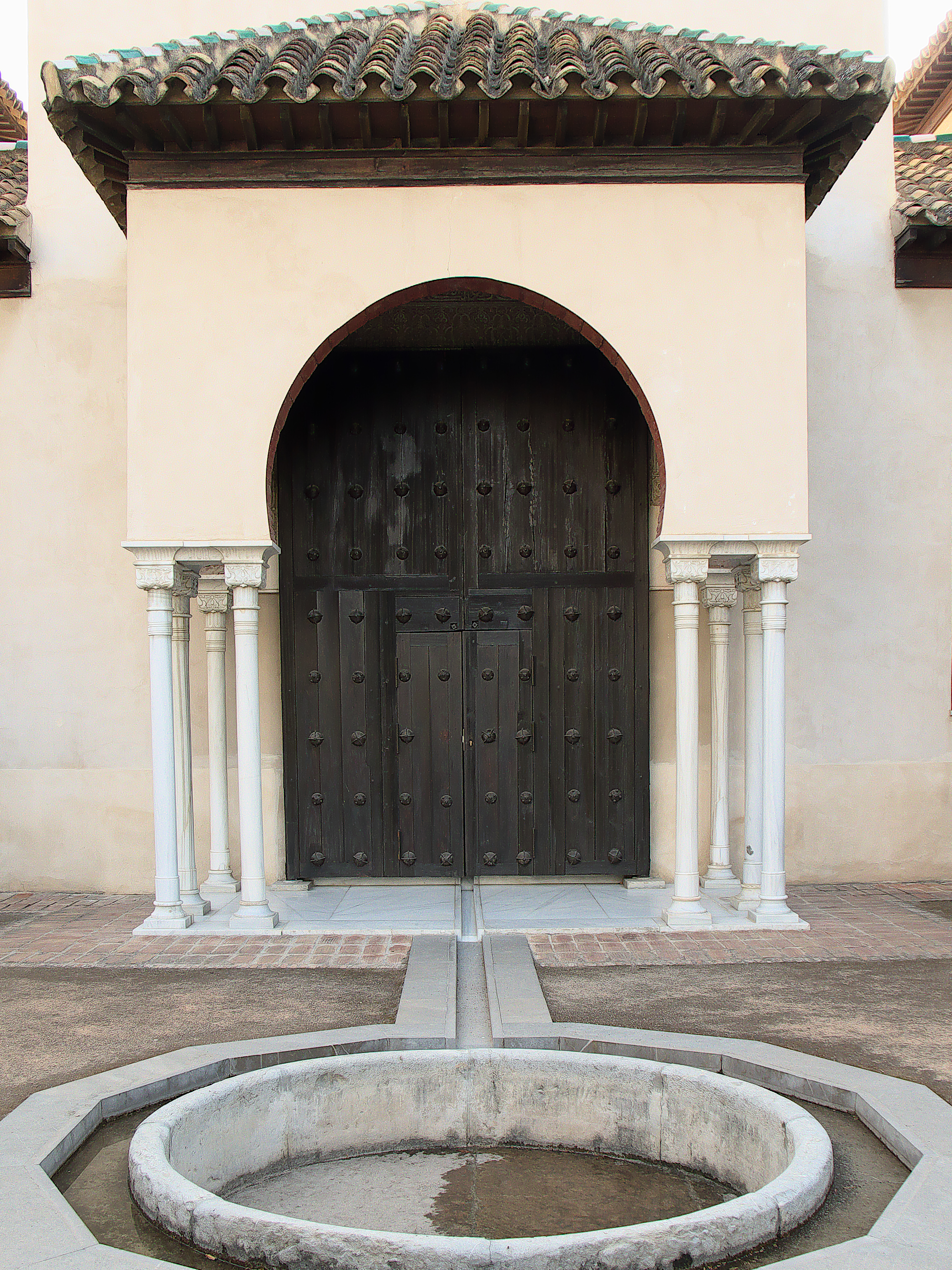 Pórtico de la entrada.